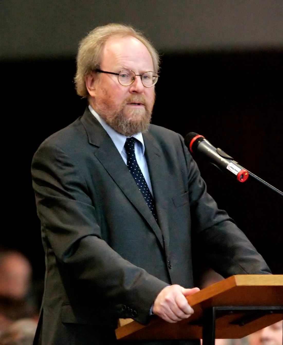 Wolfgang Thierse bei seiner Laudatio anlässlich der Verleihung des Memminger Freiheitspreises 1525 im Jahr 2005.